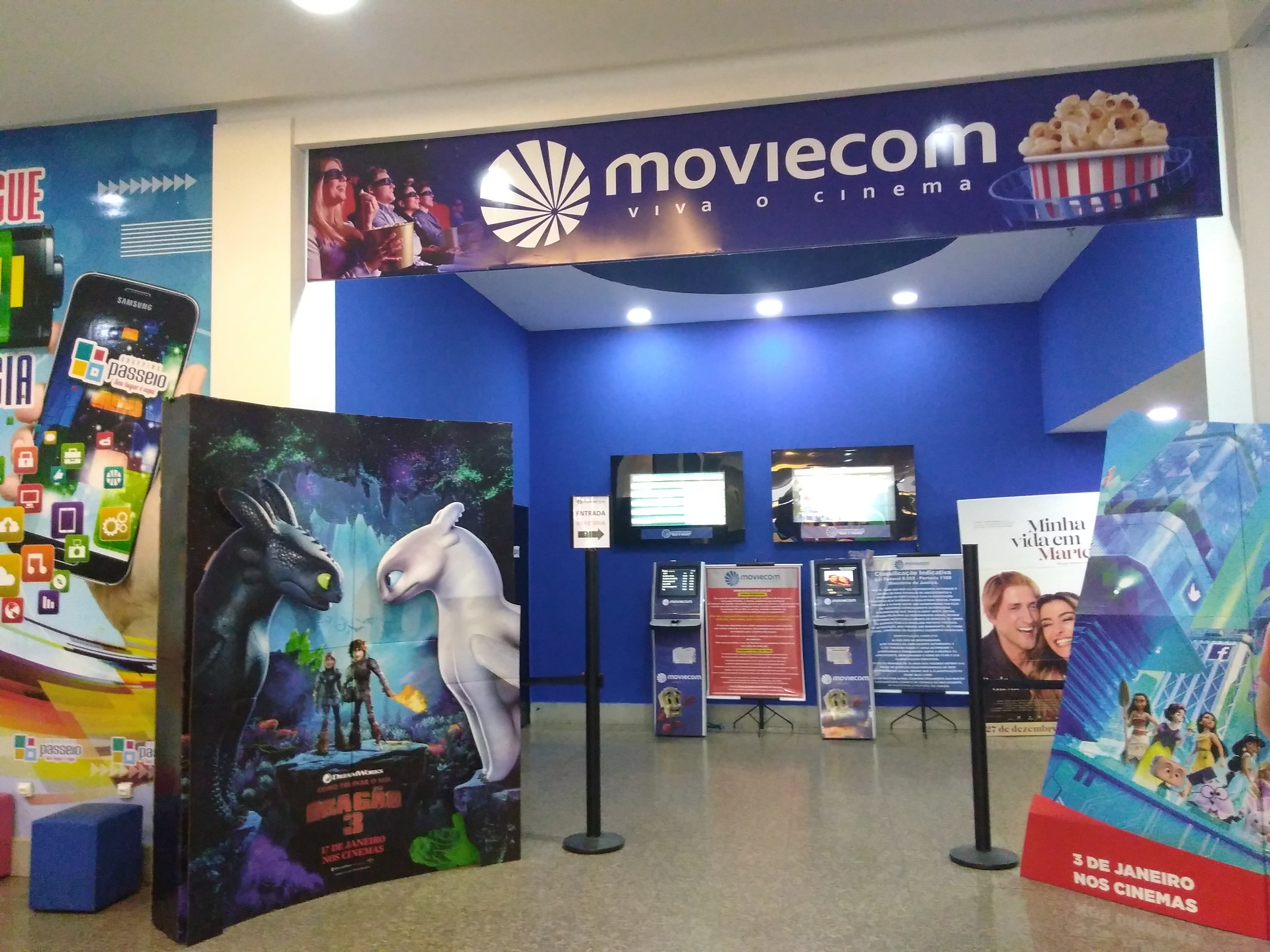 Áreas externas e internas do cinema Moviecom Shopping Passeio, instalado no Shopping Passeio da cidade de São Luís, MA